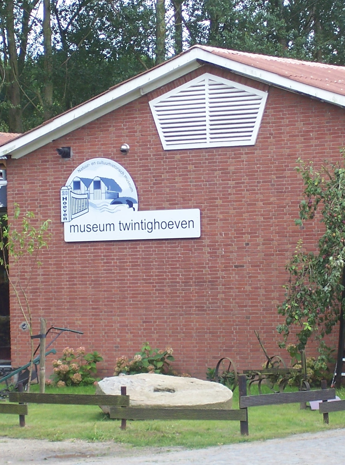 Zicht op een deel van het Natuurmuseum Twintighoeven, Noorderelsweg 2a, 3329 KH Dordrecht